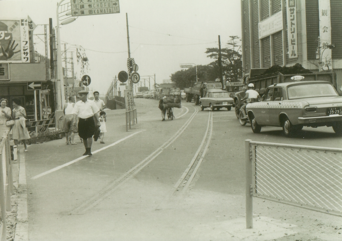 二子橋の鉄道軌道跡（玉電溝口線）。なお、 によると鉄道橋が専用橋として分離されたのが1966年と記載されていることから、写真の撮影時期は同1966年～玉電が廃止される1969年の間の昭和40年代前半と推定される（写真撮影者：大勝庵・玉電と郷土の歴史館 大塚勝利）。